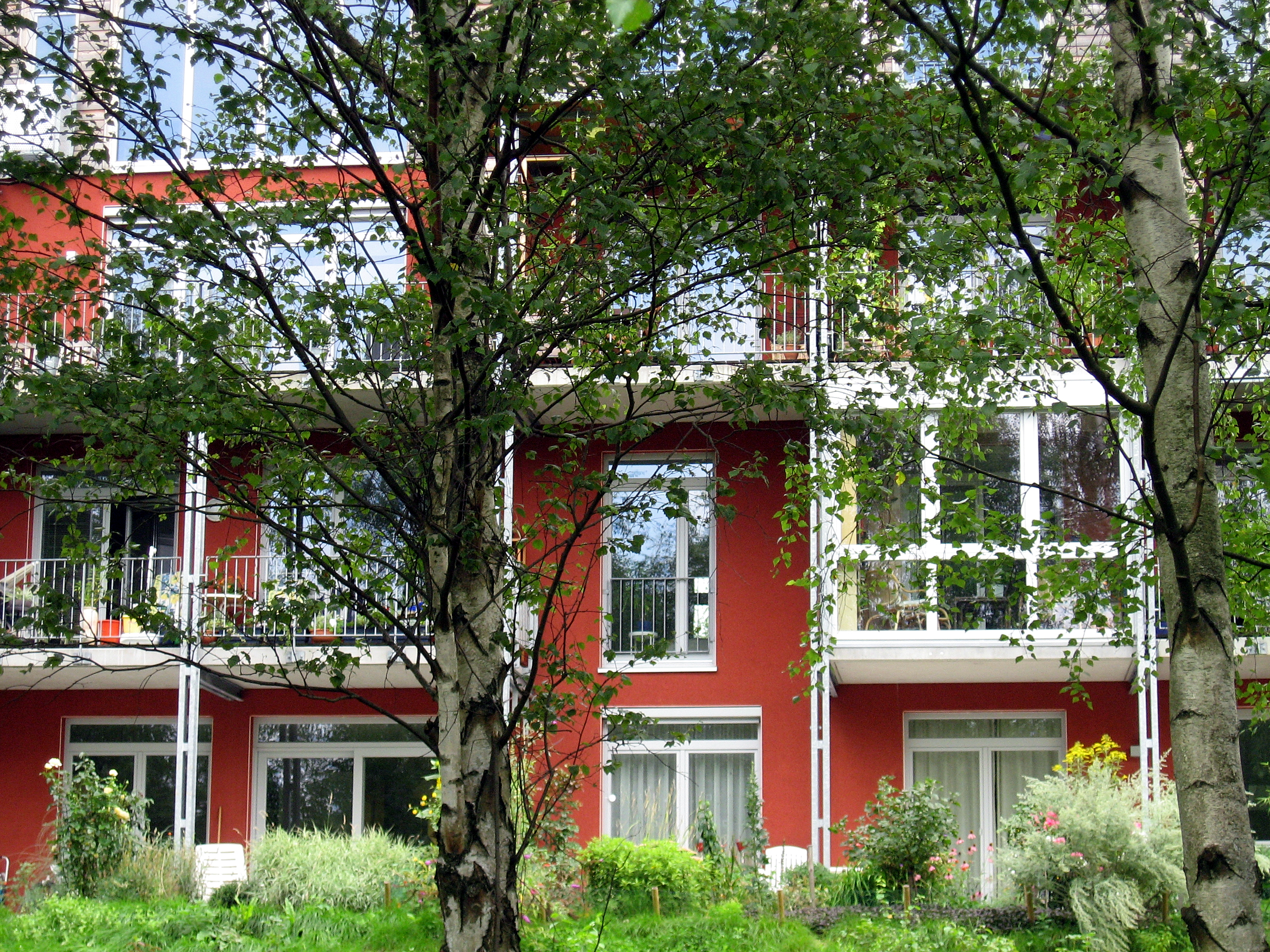 Dortmund-Tremonia-Park-Neubebauung